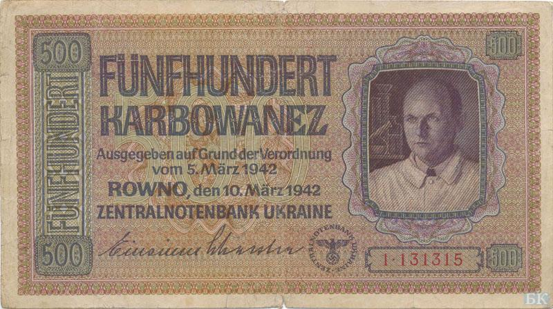 500 карбованцев Рейхскомиссариата Украина, Ровно, март 1942. аверс.